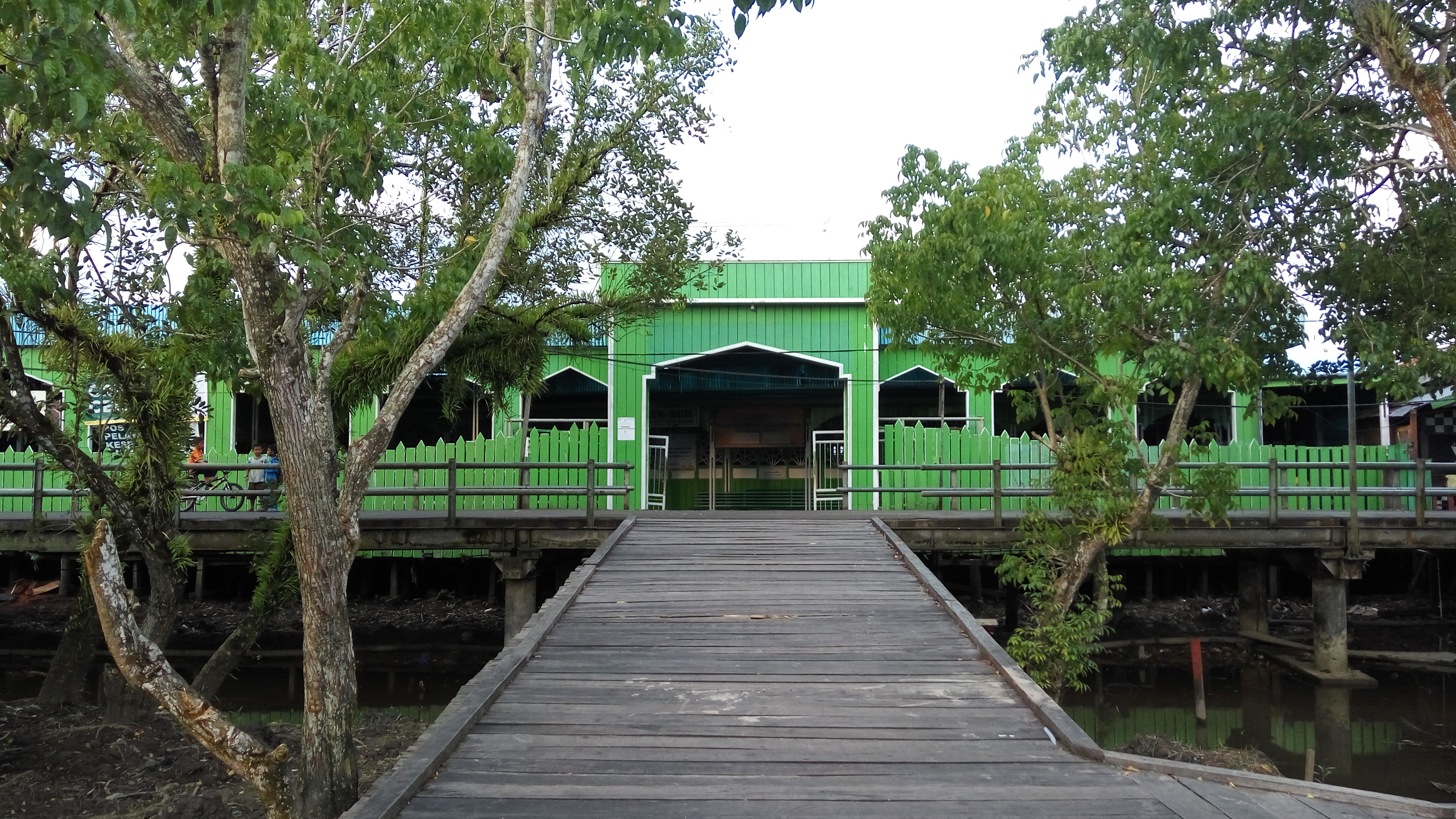 Masjid Agung Asmat